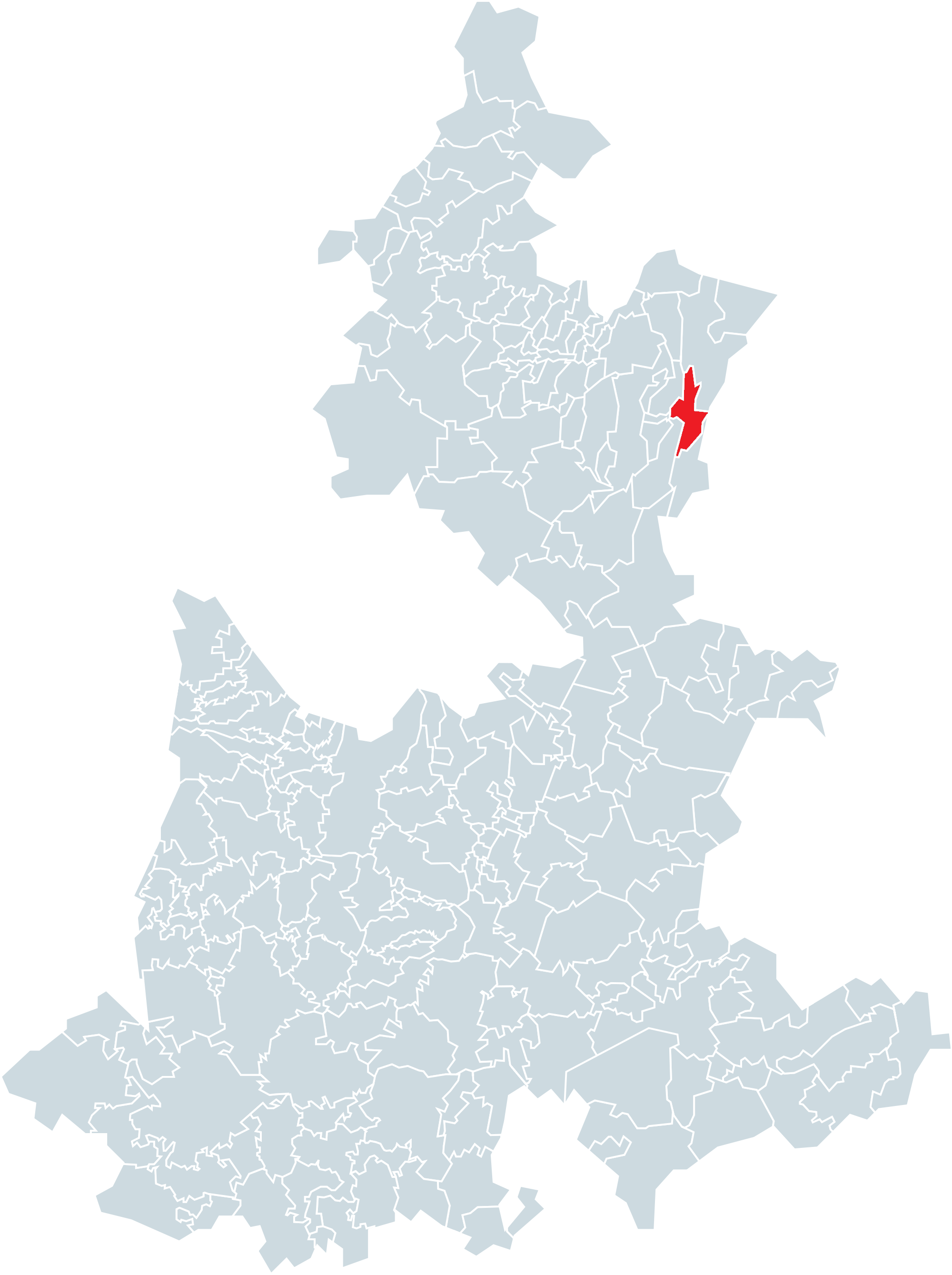 Municipio de Teziutlán